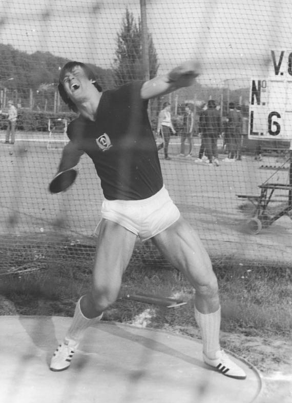 Wolfgang Schmidt ADN-ZB Mittelstädt 12.05.1976 Berlin:Wolfgang Schmidt mit Diskusrekord-Der DDR-Meister Wolfgang Schmidt (SC Dynamo Berlin) erzielte zum Auftakt eines DDR-offenen Abendsportfestes am 12.05.1976 im Berliner Sportforum mit 68,04 m einen neuen DDR-Rekord im Diskuswerfen. Er verbesserte mit diesem Wurf (unser Foto) die zwei Wochen alte Höchstleistung des Schweriners Norbert Thiede um 1,14 m.